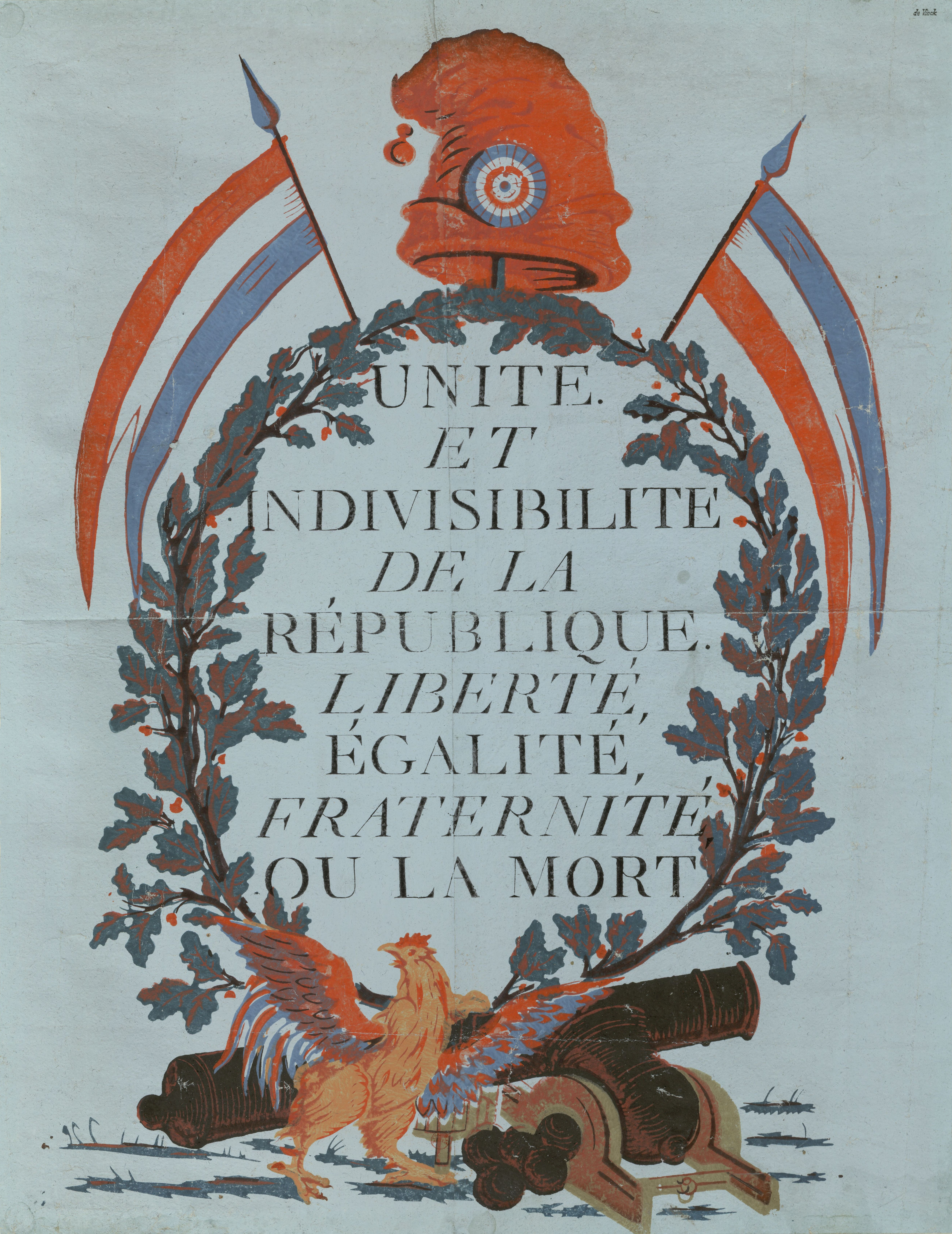 Estampe de 1793 reprenant un motif courant de la Première République : le slogan "Unité, Indivisibilité de la République, Liberté, Egalité, Fraternité ou la Mort" entouré de branches de chêne, de drapeaux tricolores, placé devant un faisceau de licteur surmonté d'un bonnet phrygien. Au premier plan, un coq gaulois et des canons guerriers. De nombreuses versions existent sur le même thème.